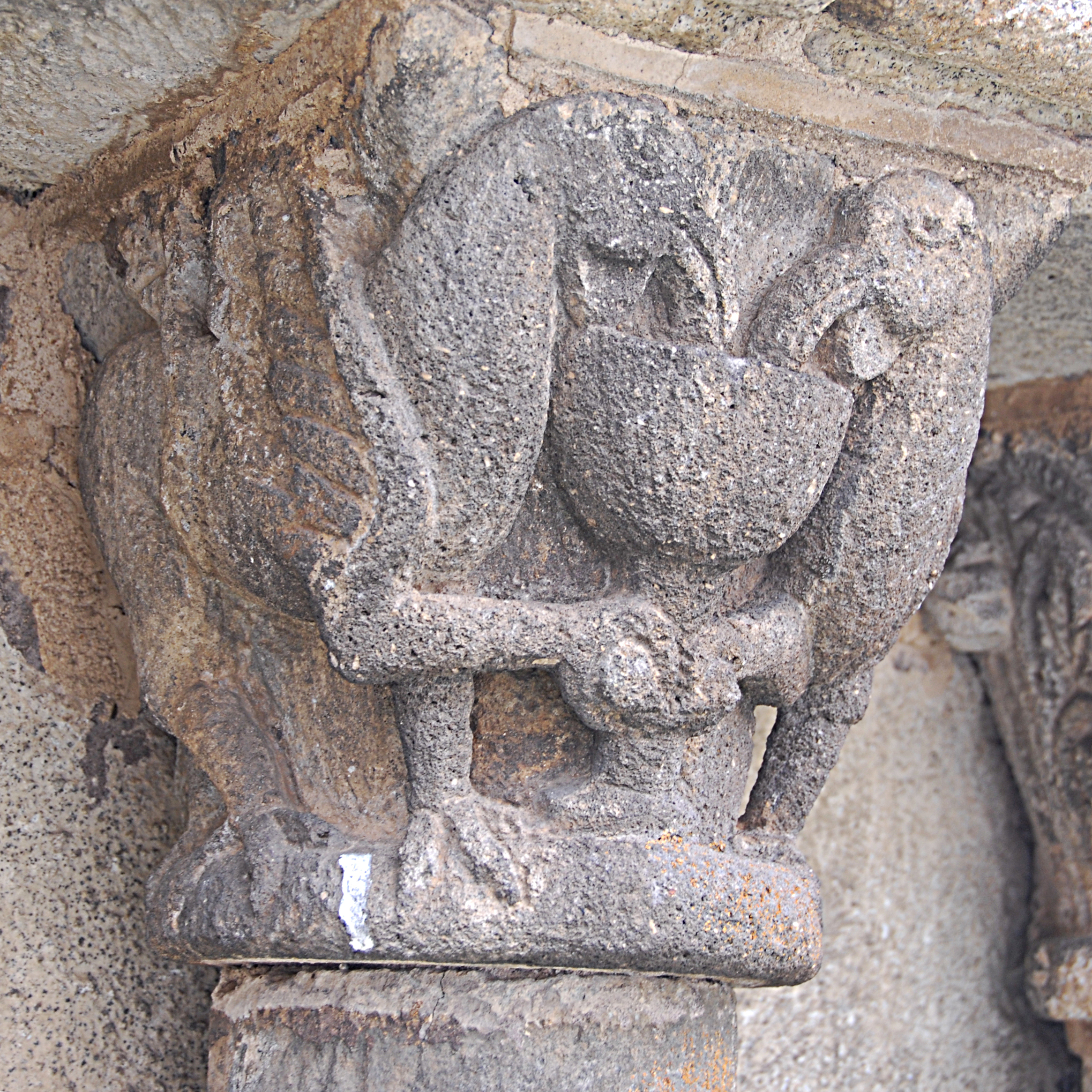 Chambon-sur-Lac, Friedhofskapelle, Kapitell, 2 Greife trinken aus Kelch